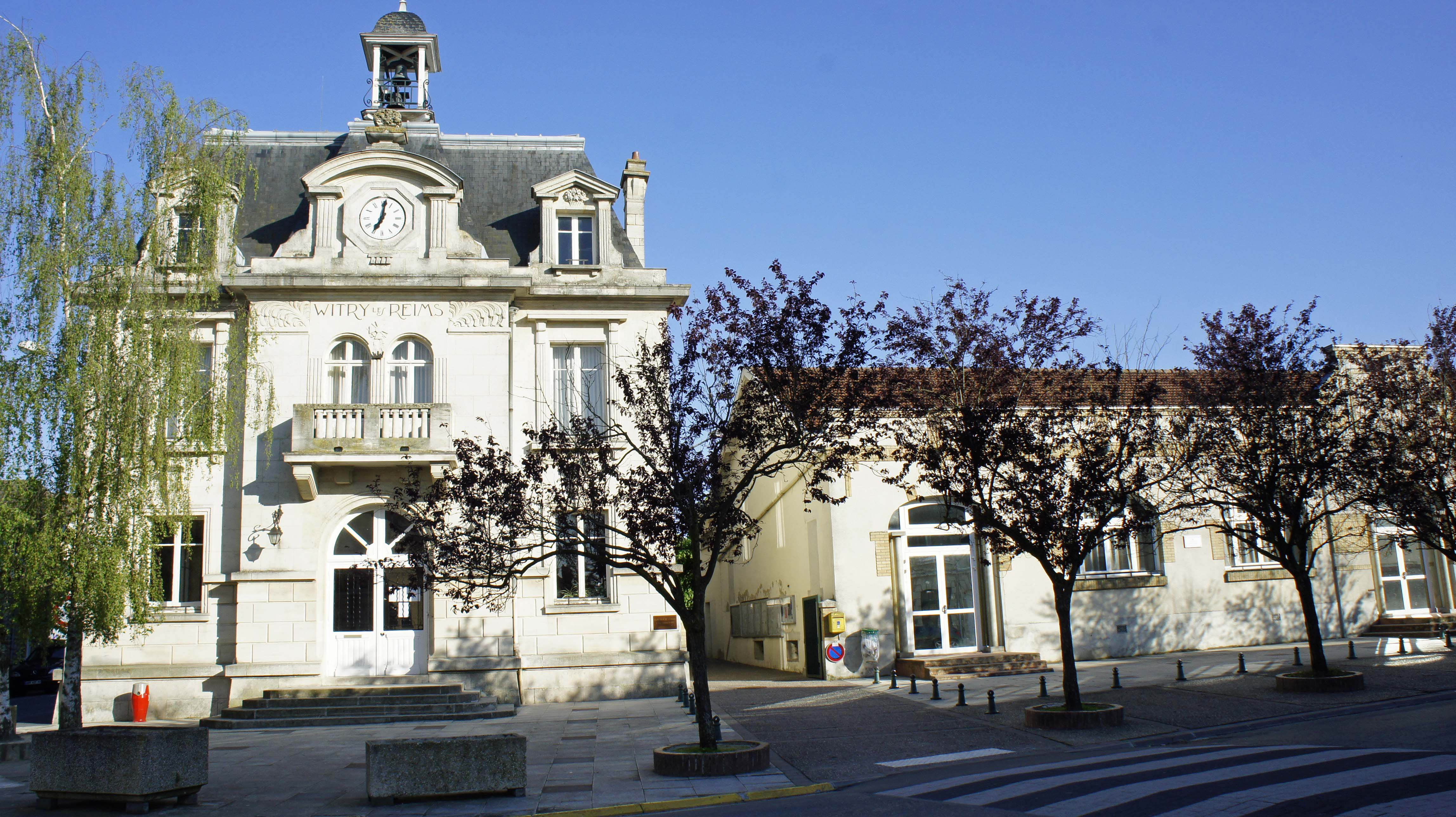 Vue de la Mairie de Witry.